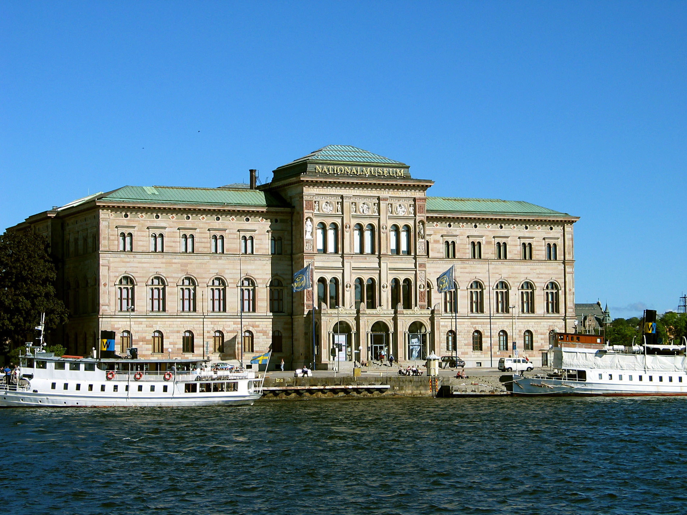 Nationalmuseum, Stockholm, Sweden.